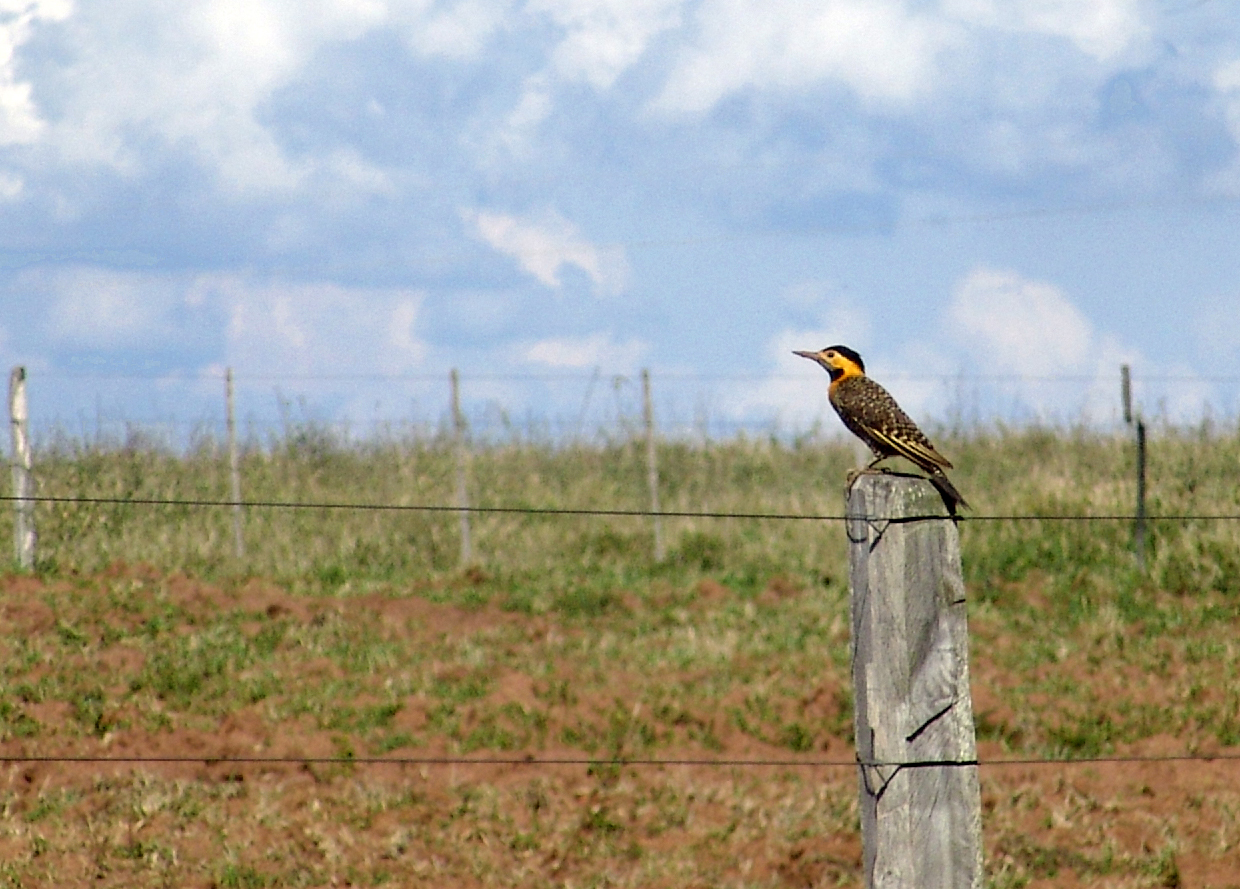 Colaptes campestris. Pica-pau, Avaré, São Paulo, Brasil